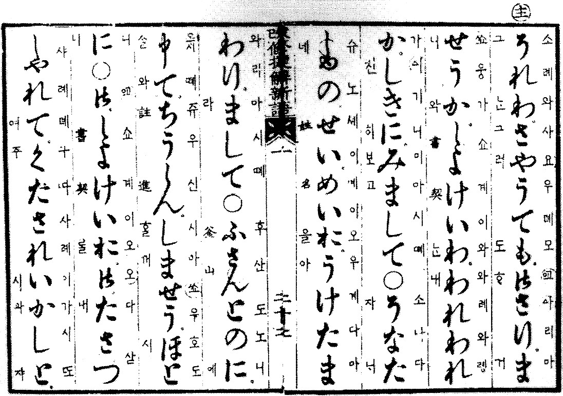 「No.67 捷解新語」のうち「重刊改修本捷解新語」『国語史資料集——図録と解説——』国語学会（編）、武蔵野書院、1976年。安田章（解説）。をスキャン。